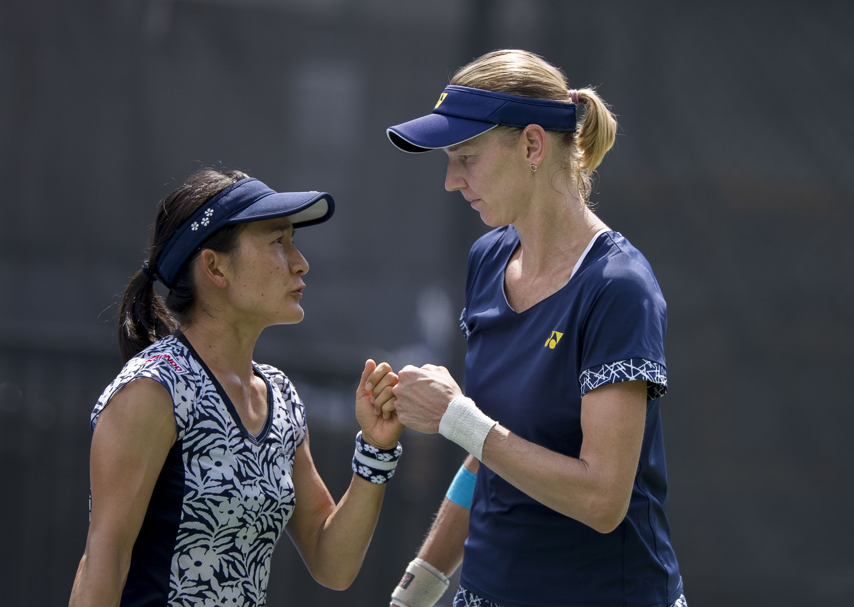 Citi Open Tennis 2017